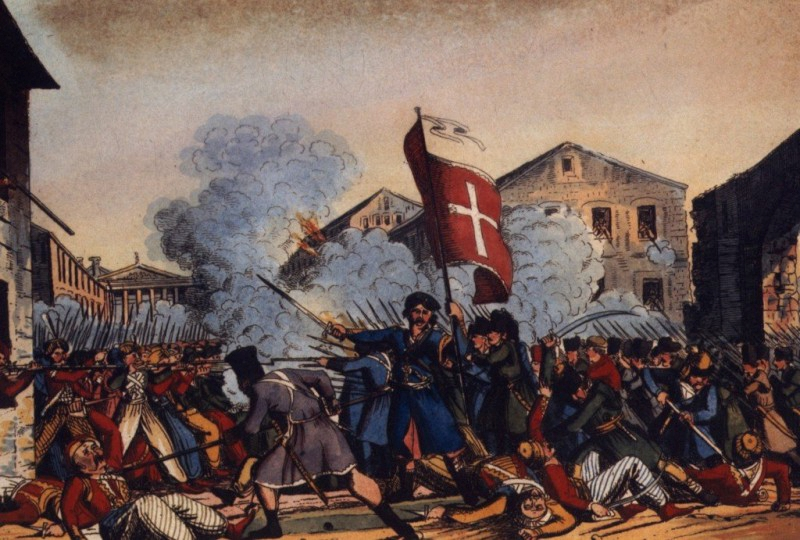 Η πολιορκία της Τριπολιτσάς